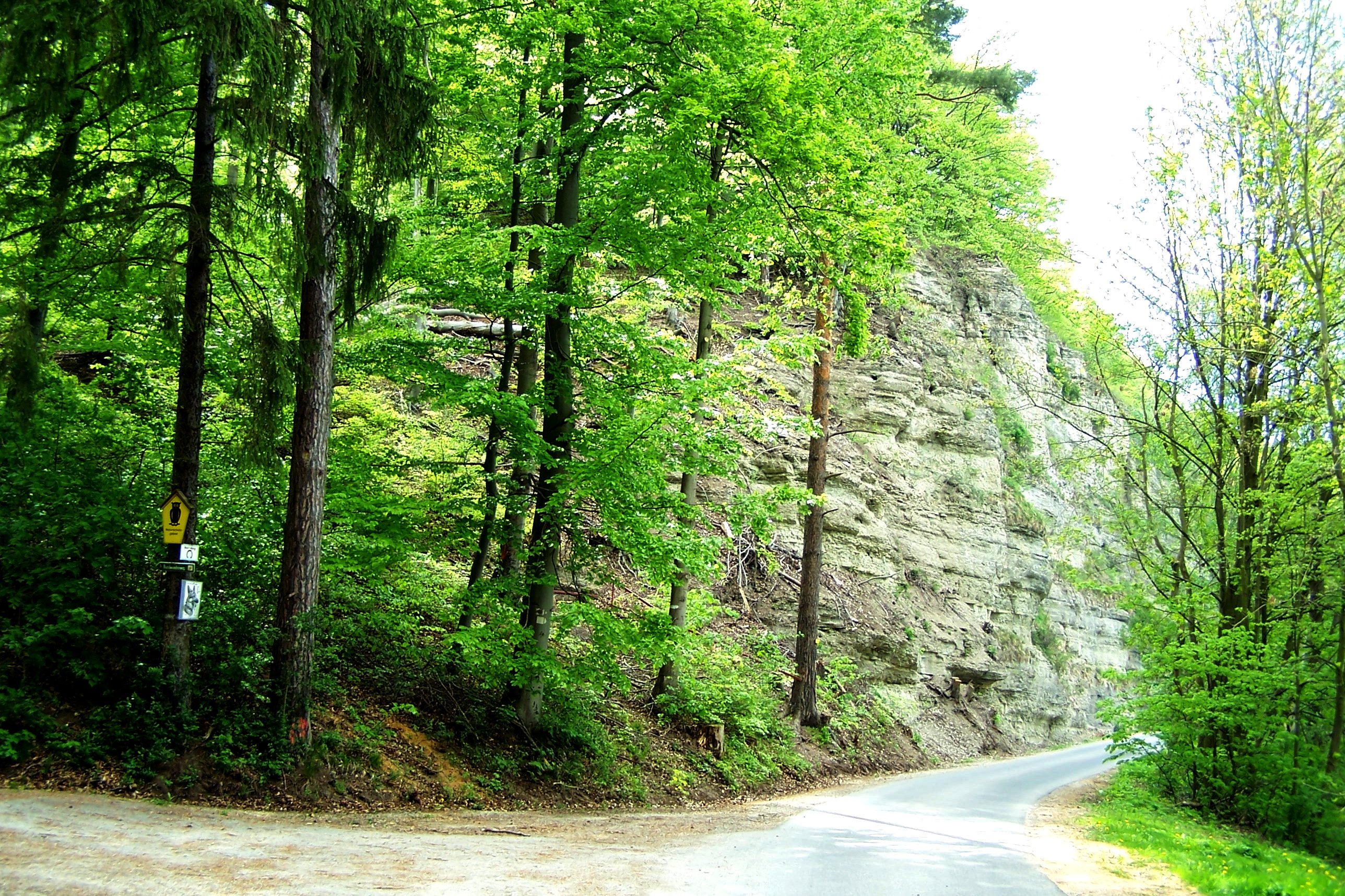 Am Eingang in das Ziegental, es führt als Schlucht zum etwa 100 m höher gelegen Plateau.